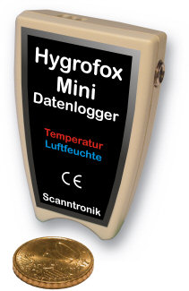 Klima-Datenlogger für Luftfeuchte und Temperatur